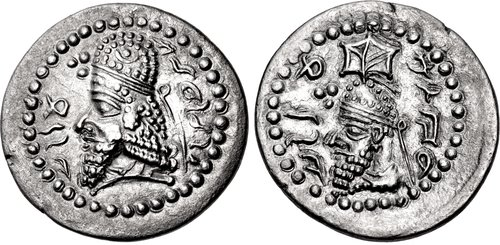 Hemidracma de Sapor e Pabaco de ca. 200-209